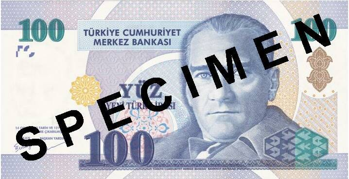 100 YTL ön